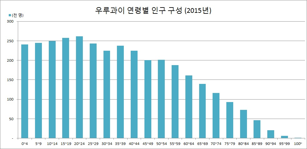 한국어 (조선): 우루과이 연령별 인구 구성 (2015년 UN 통계자료를 바탕으로 제작)